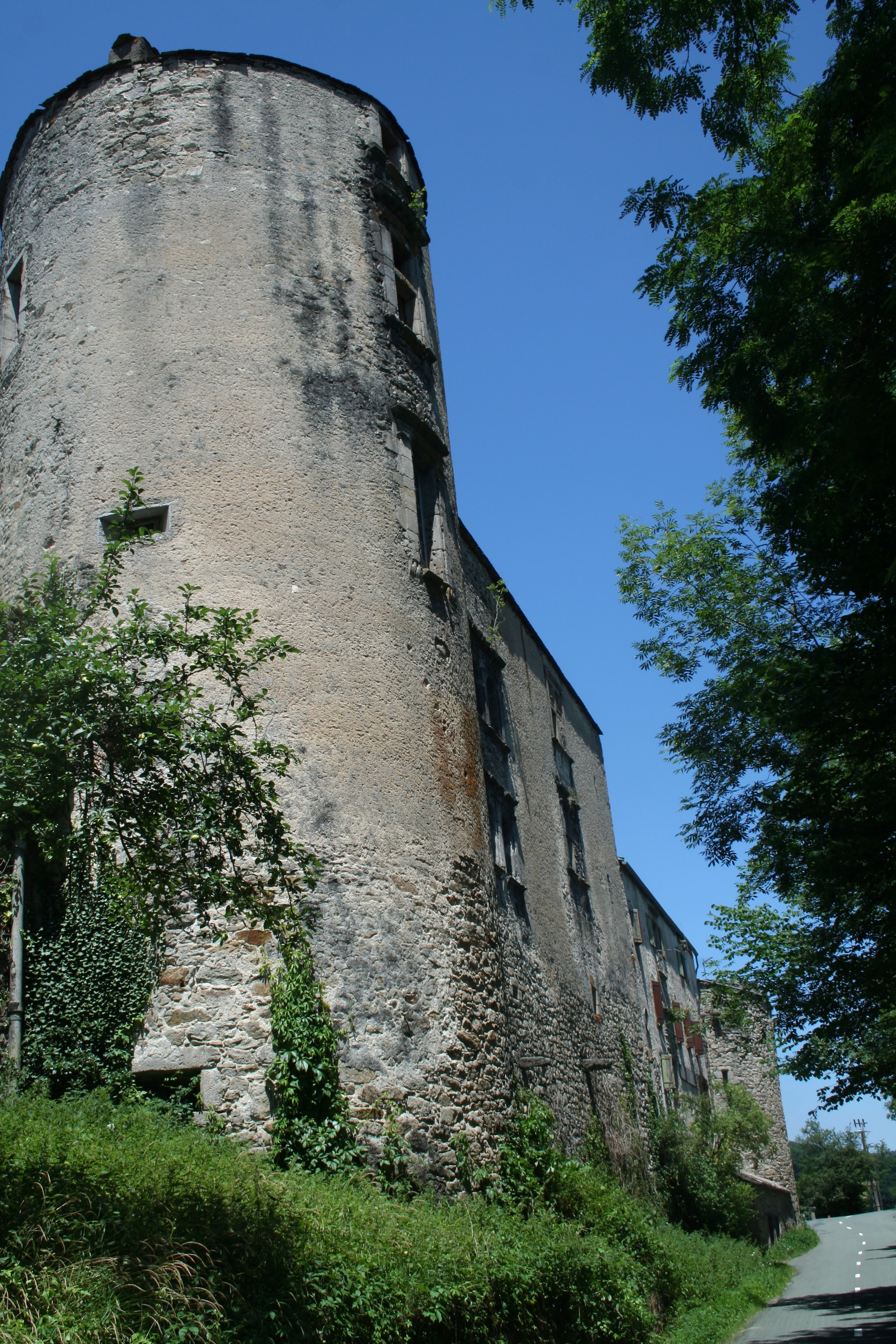 Ferrières (Tarn) - château